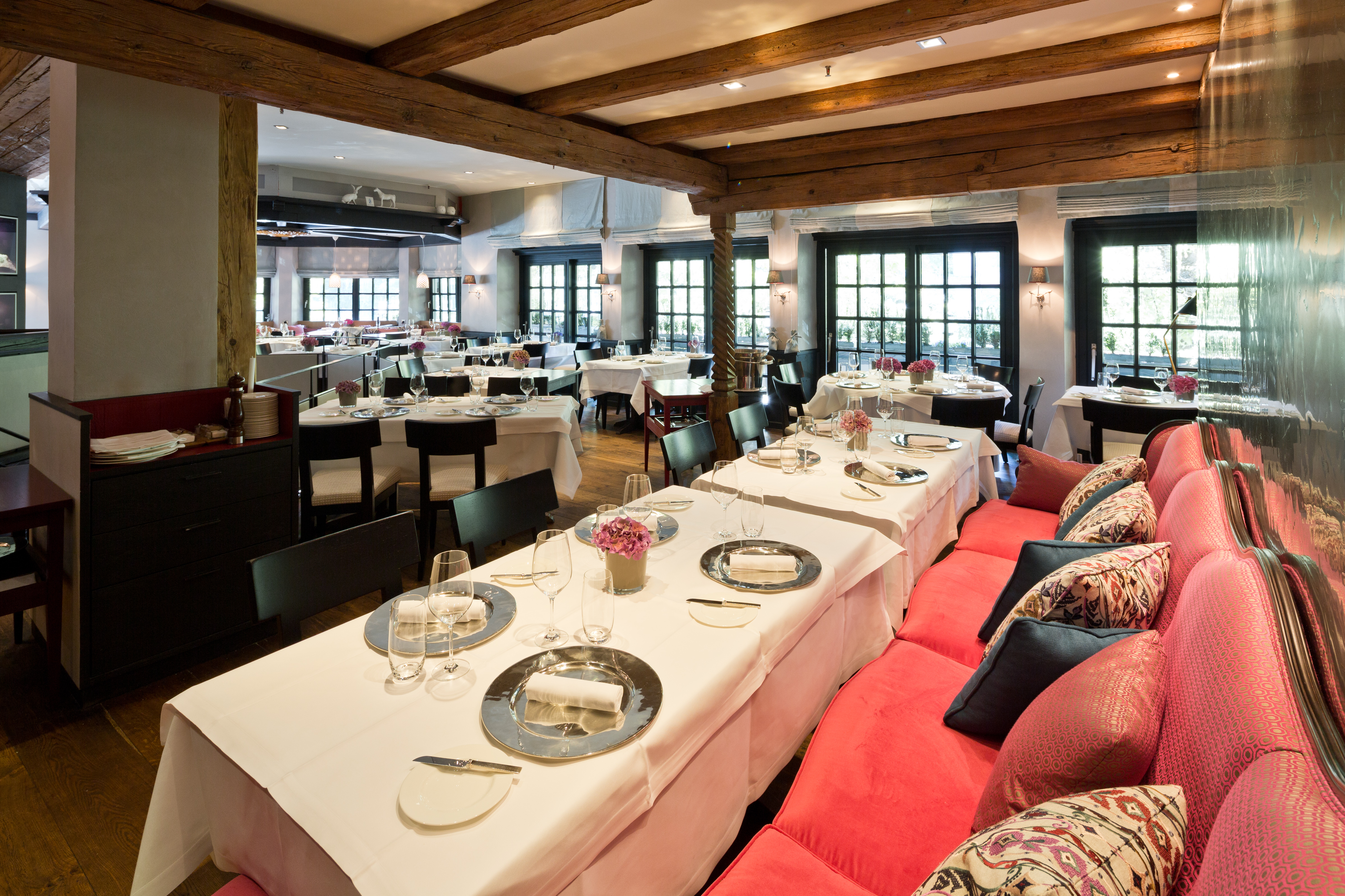 Käfer-Schänke im Stammhaus in der Prinzregentenstraße